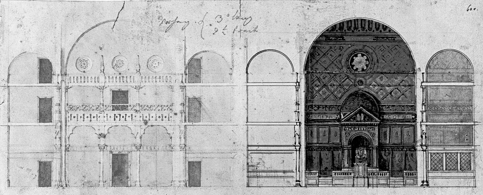 Dresden Synagoge